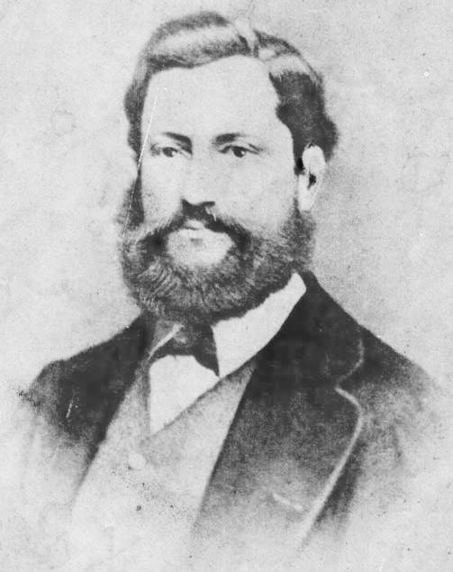 German Tenderini y Vacca (Carrara, Toscana, 1828 - Santiago, 8 de diciembre de 18701 ) fue un artista, filántropo y comerciante italiano radicado en Chile y el primer mártir del Cuerpo de Bomberos de Santiago.